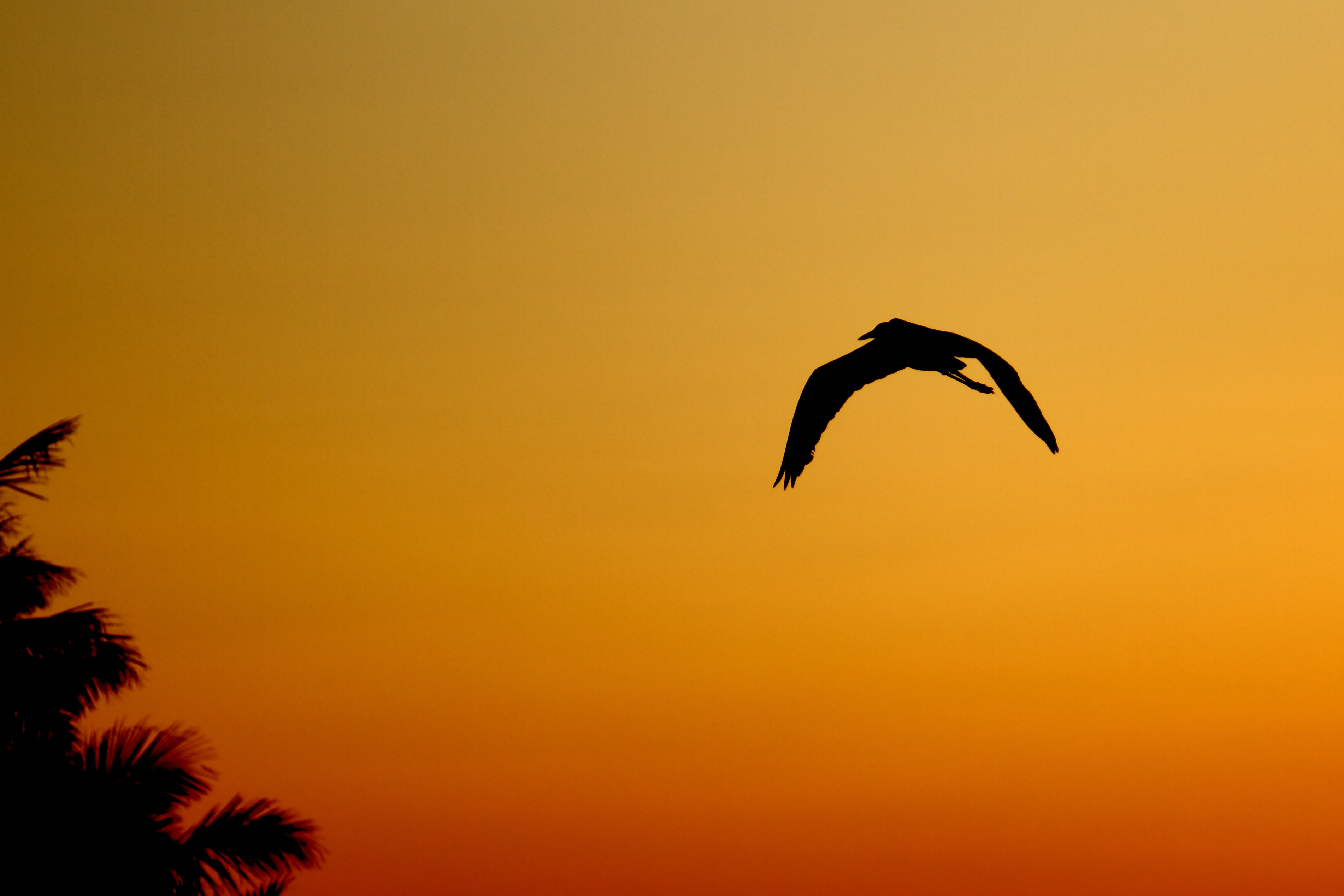 Sunset Flight